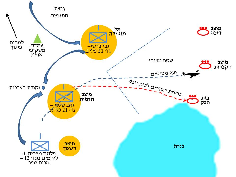 מרשם קרב מוצב "הדמות" - מאי 1951